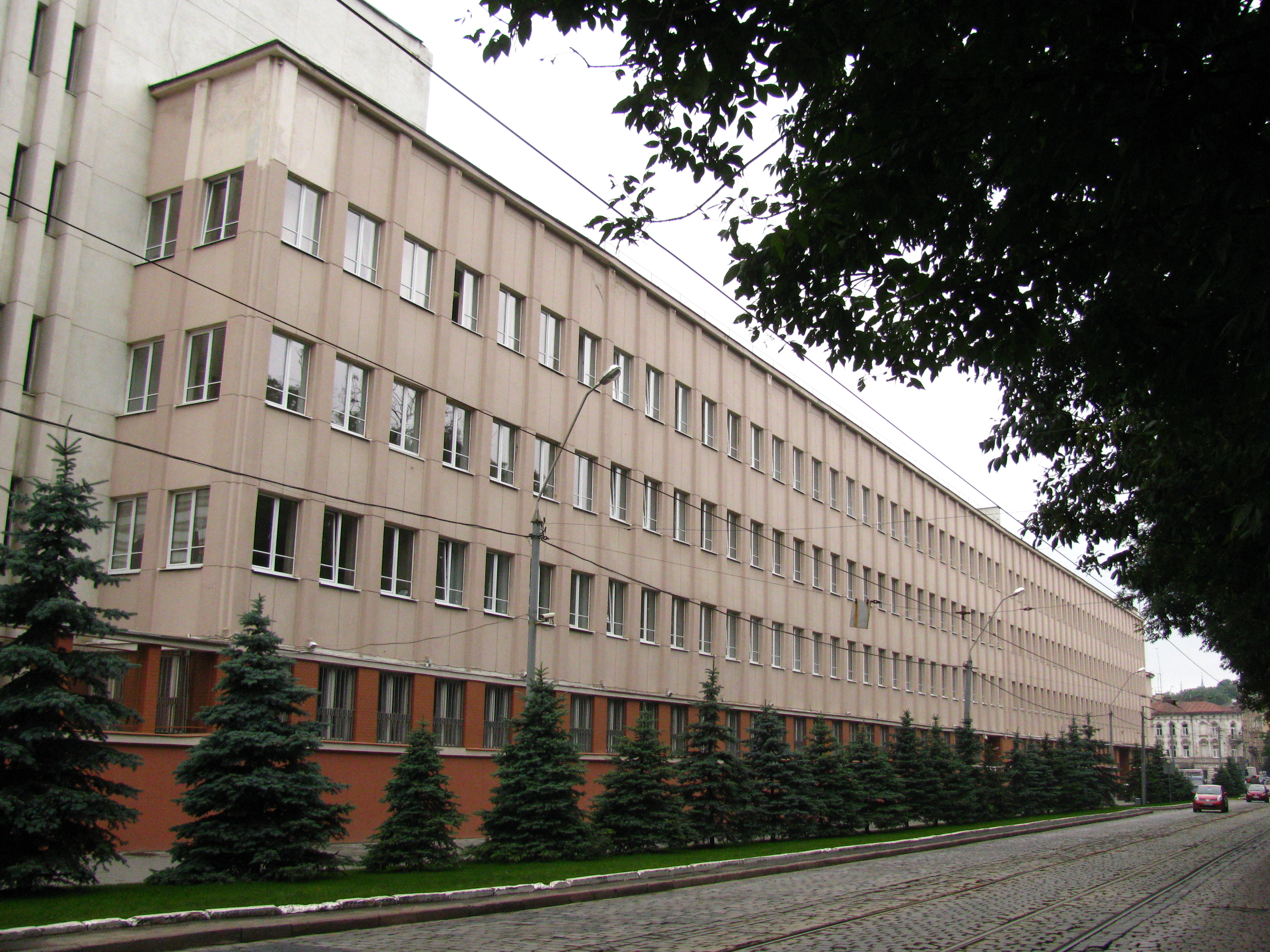 Будинок по вулиці Вітовського, 55 у Львові